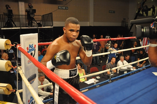 Hairon "El Maja" Socarras luego de su victoria frente a Eduardo Melendez el 26/Ago/2011